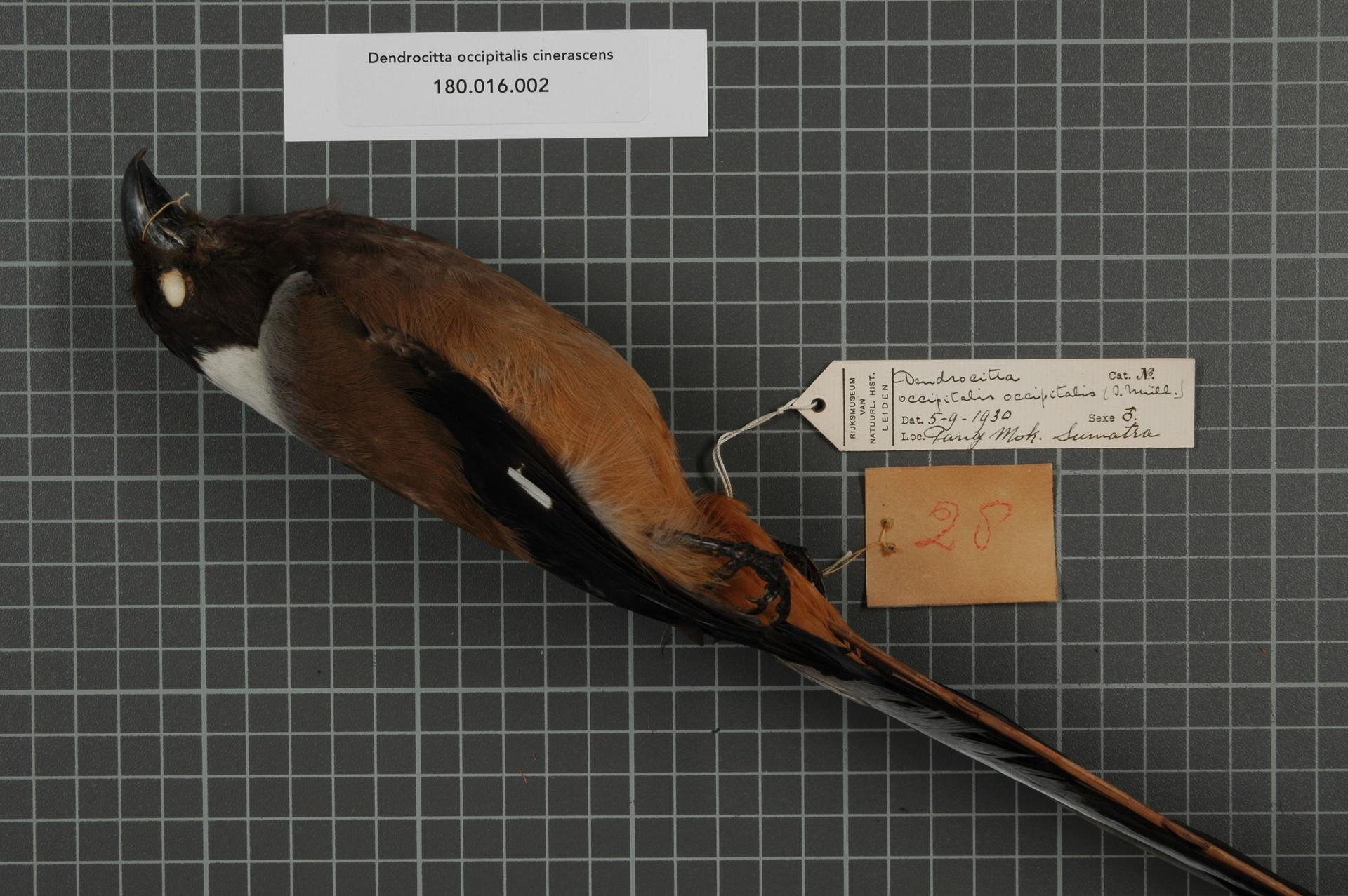 Dendrocitta occipitalis occipitalis Müller, 1836